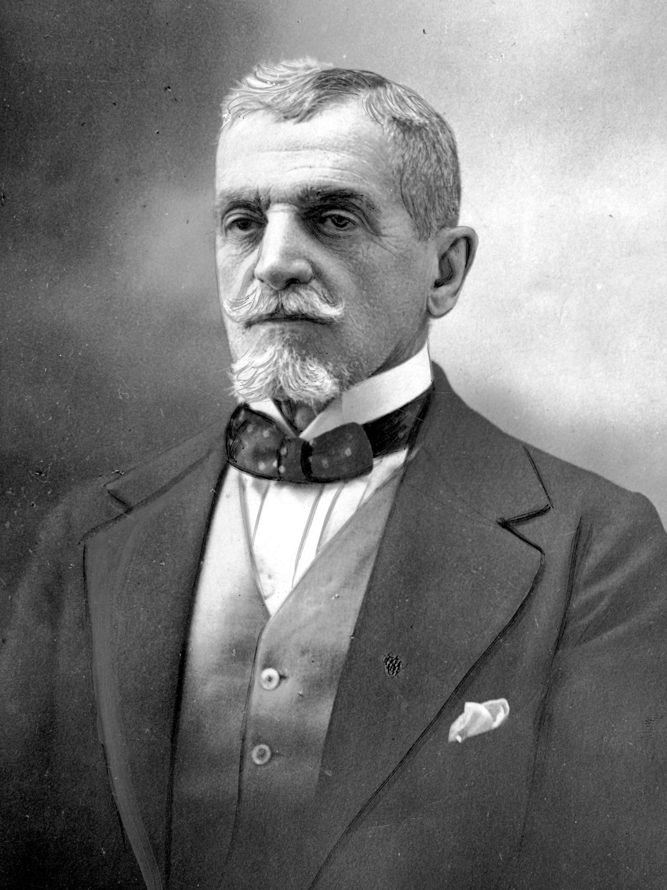 Leopold Julian Kronenberg - finansista i bankier (1849-1937)